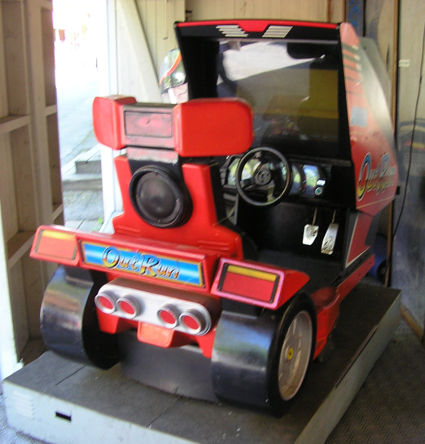 Out Run sit-down cabinet.